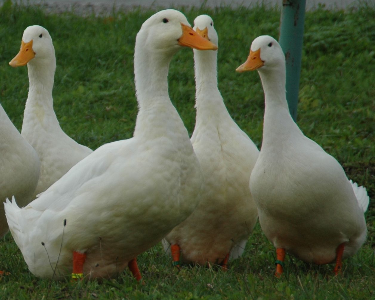 →This file has been extracted from another file: Amerikanische Pekingenten 2013 03.JPG